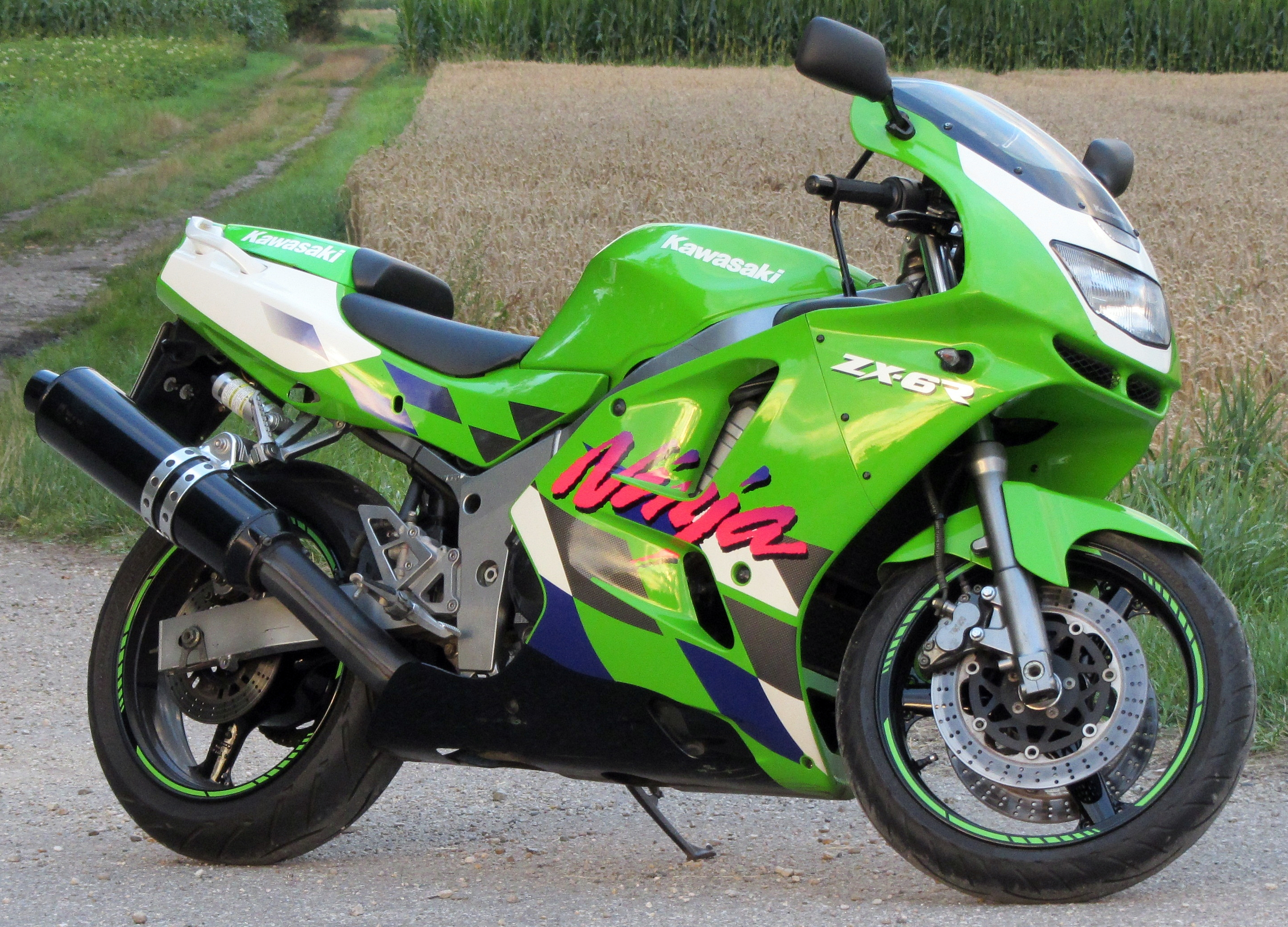 Kawasaki Ninja ZX-6R Baujahr 1997, nahezu Originalzustand bis auf die Farbe der Felgen und die Blinker, Frontansicht